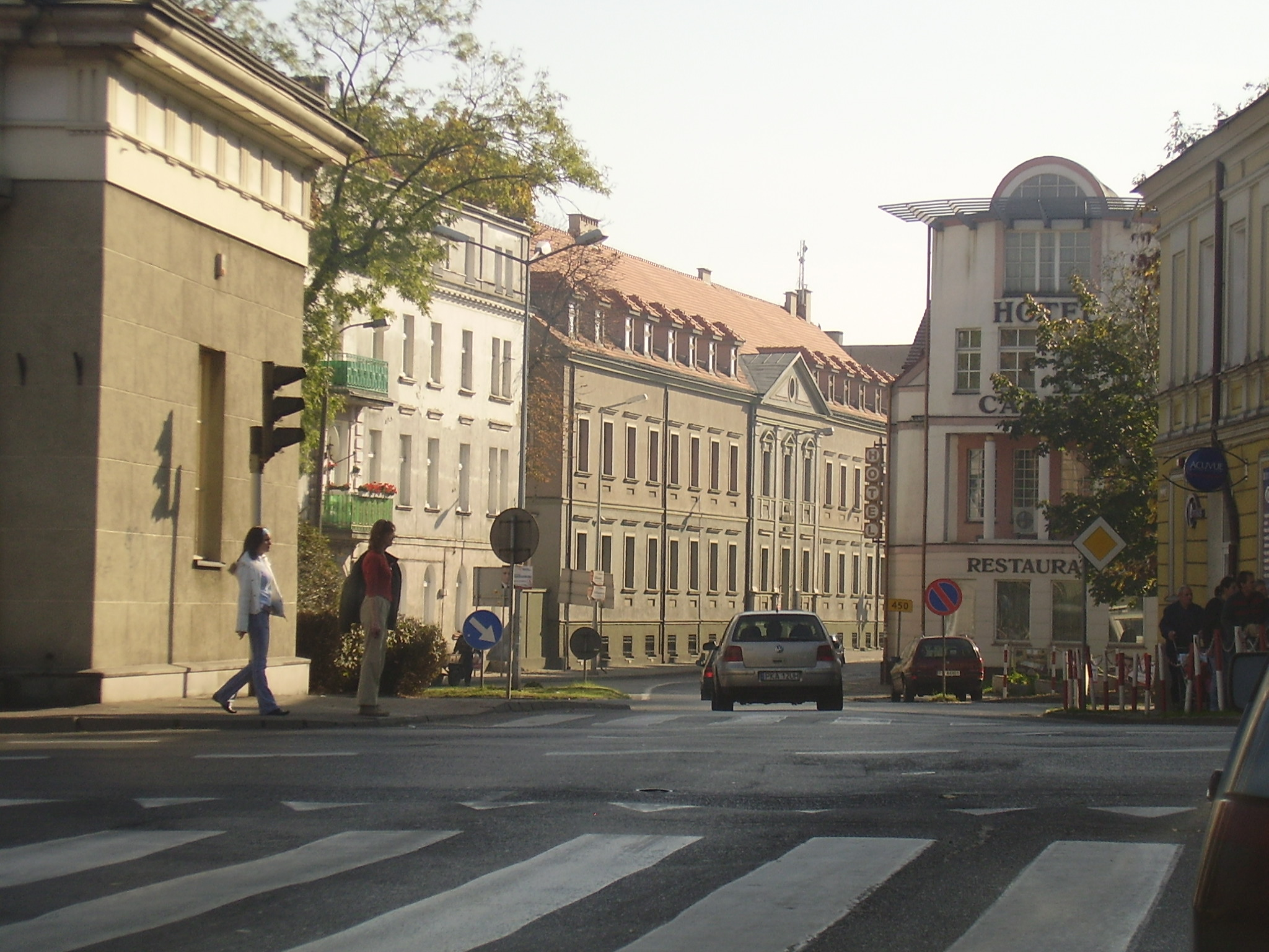 Państwowa Wyższa Szkoła Zawodowa im. Prezydenta Stanisława Wojciechowskiego w Kaliszu